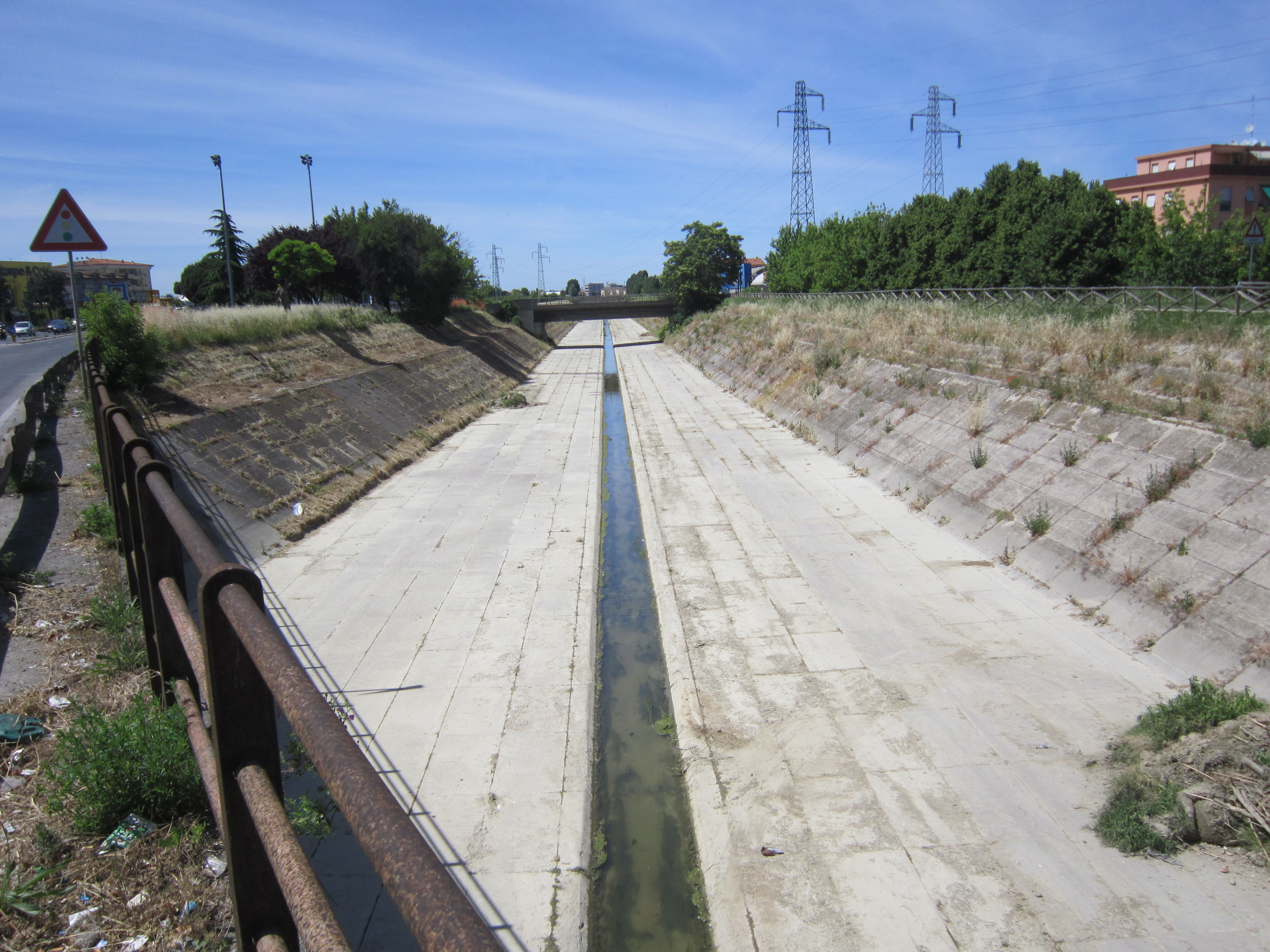 Il torrente Ausa a Rimini nei pressi della Circonvallazione Nuova (nonché strada statale 16 Adriatica).